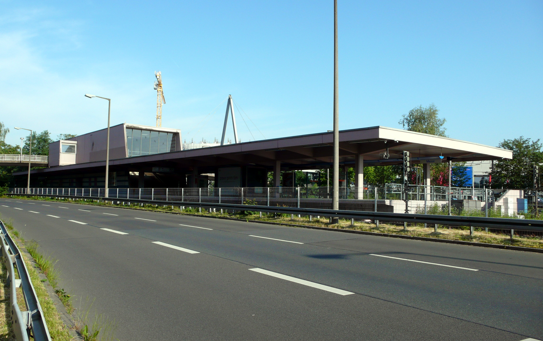 U-Bahnhof Messe der U-Bahn Nürnberg, Außenansicht, Blick von Südosten